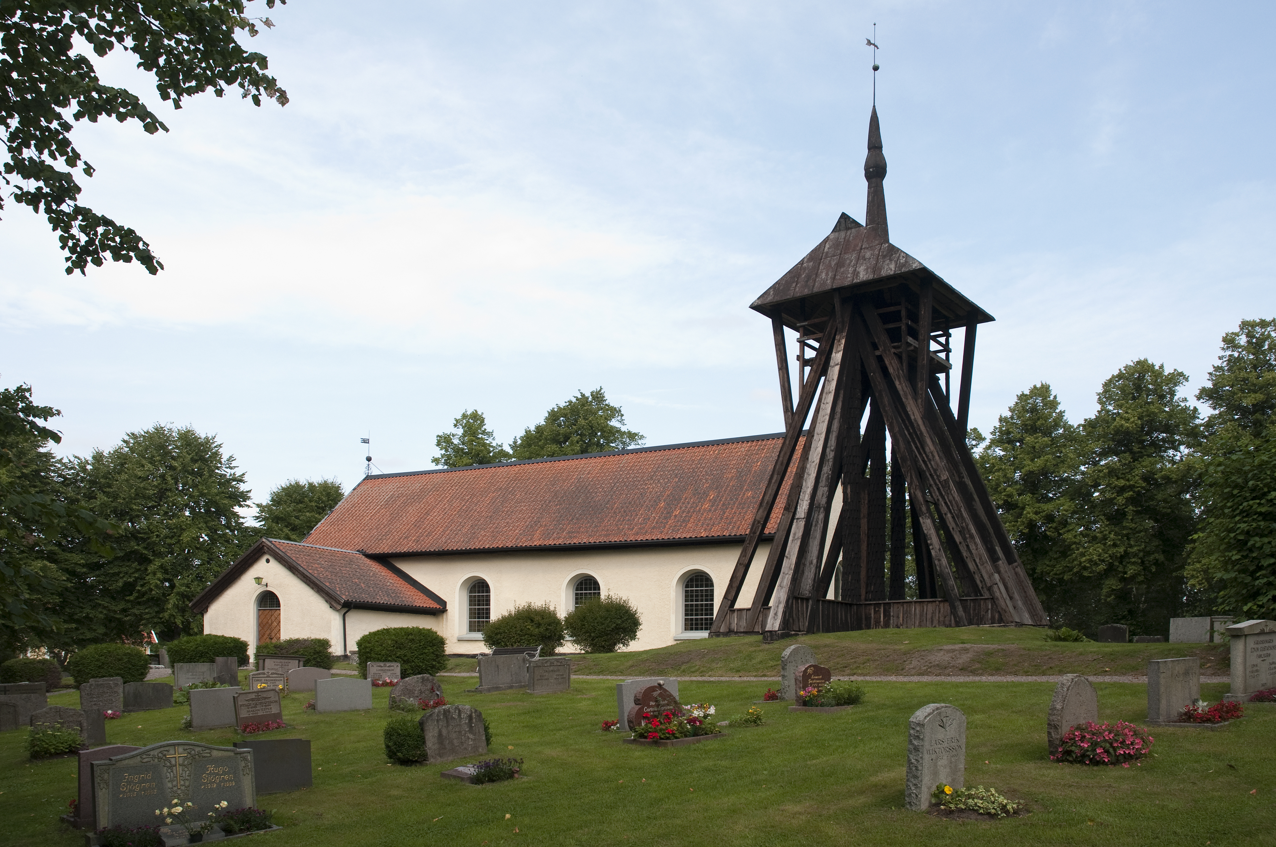 Råby-Rönö kyrka i Nyköpings kommun.